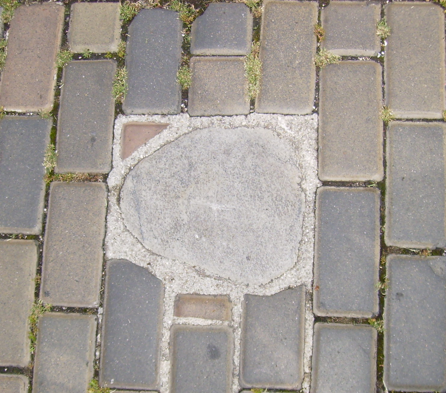 Bludný balvan